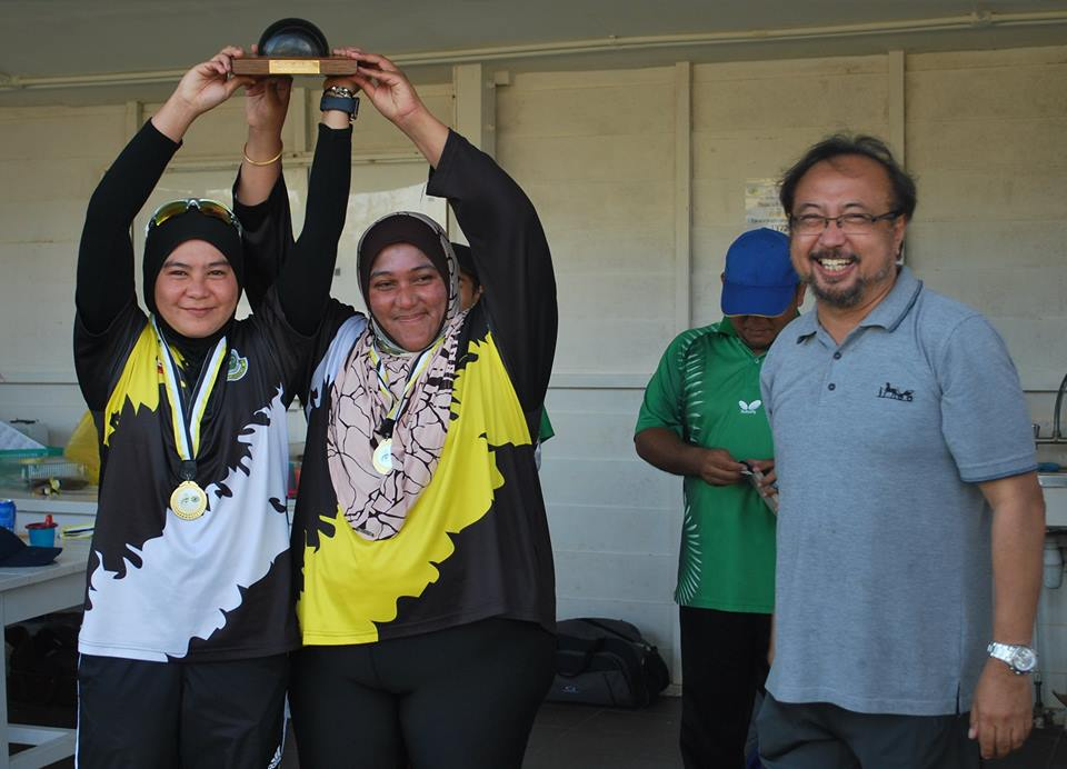 Juara Trofi Persahabatan WBC-PLBC 2017